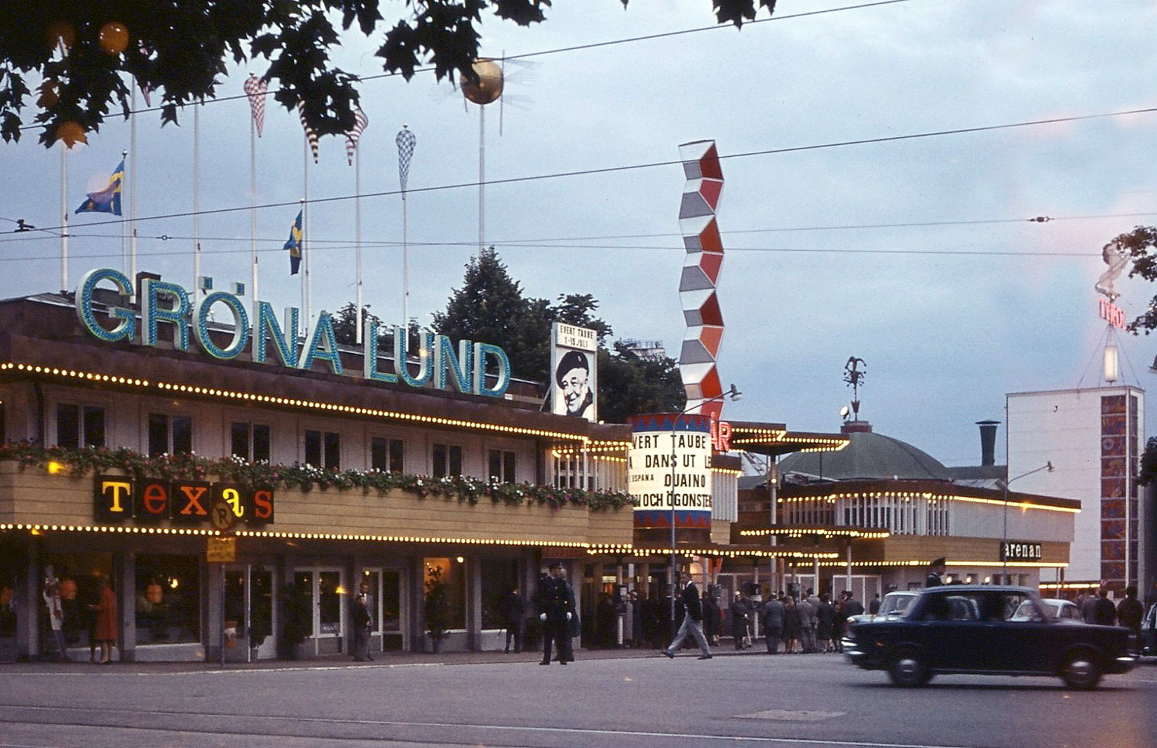 Gröna Lund i Stockholm med annonsering för Evert Taube